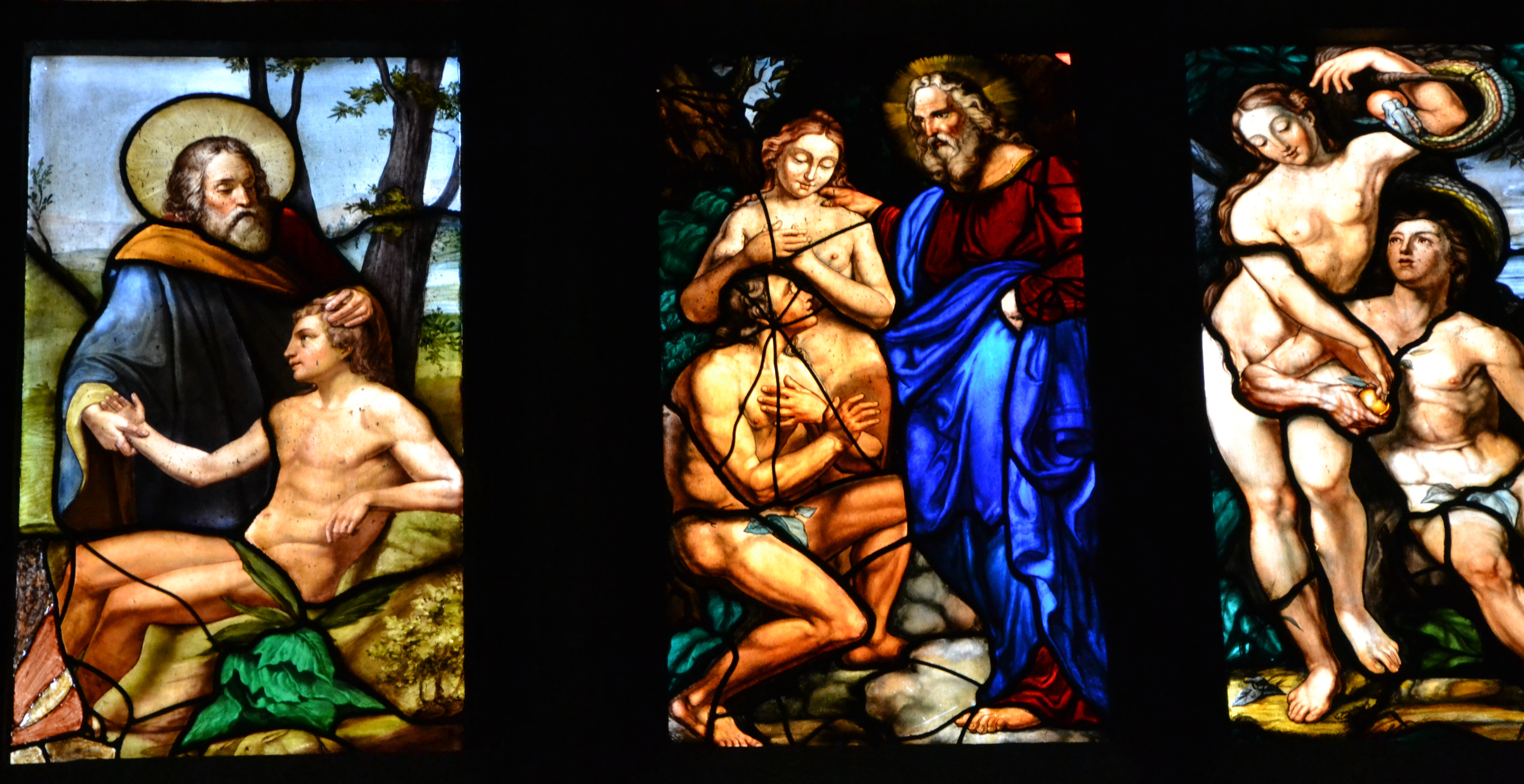 I tre immani finestroni absidali sono i più antichi ed i più ampi della cattedrale. Le due vetrate laterali , di 130 pannelli ciascuna, contengono Storie del Nuovo Testamento e Storie del Vecchio Testamento. Furono integralmente rifatte in una arco di tempo che va dal 1833 al 1865 da Giovanni Battista Bertini e dai figli Pompeo e Giuseppe, allora direttore dell'Accademia di Brera.